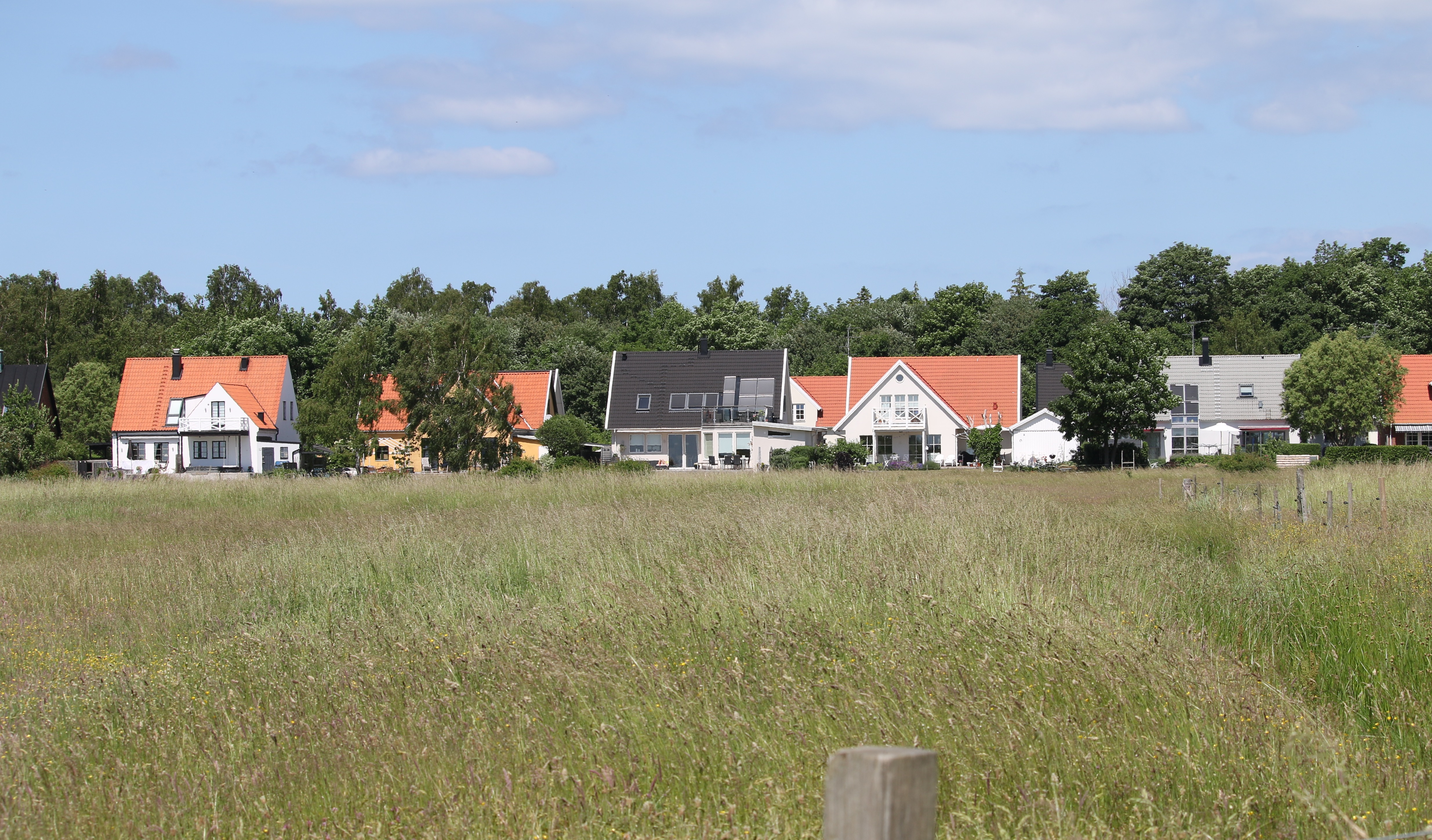 Villor i södra Klagshamn